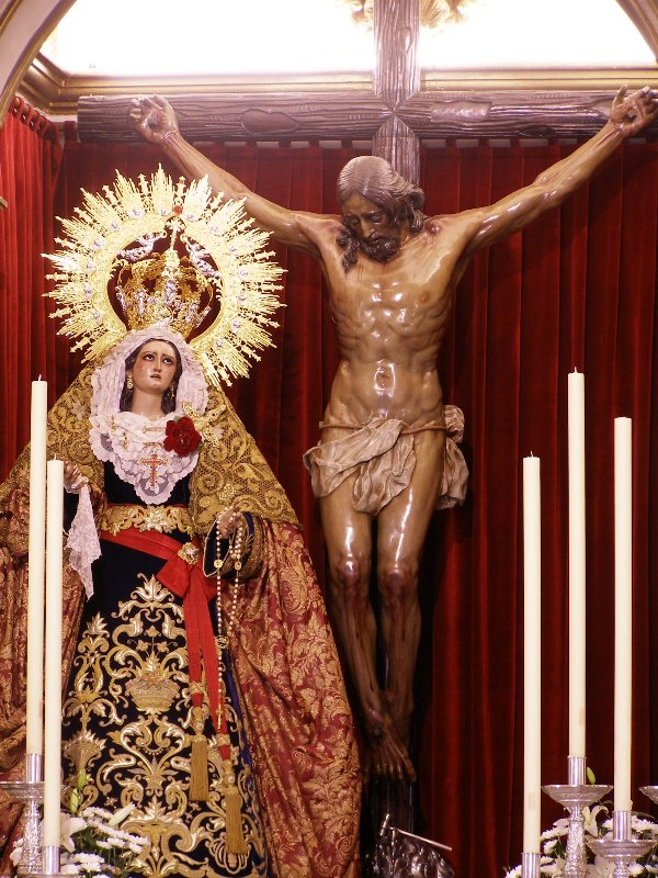 Funcion de los Sagrados titulares, Zamarrilla, Malaga